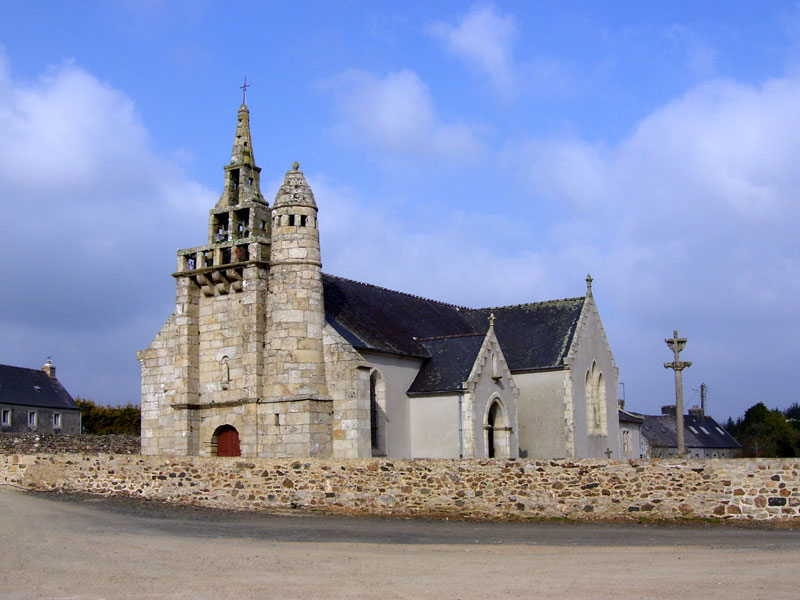 Bolazeg. Iliz